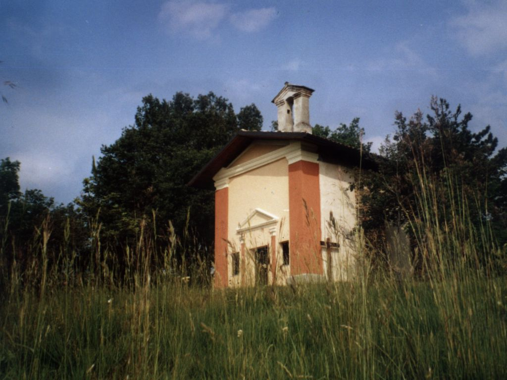 Immagine della Cappella di San Valeriano, nei boschi di Val DellaTorre(TO)